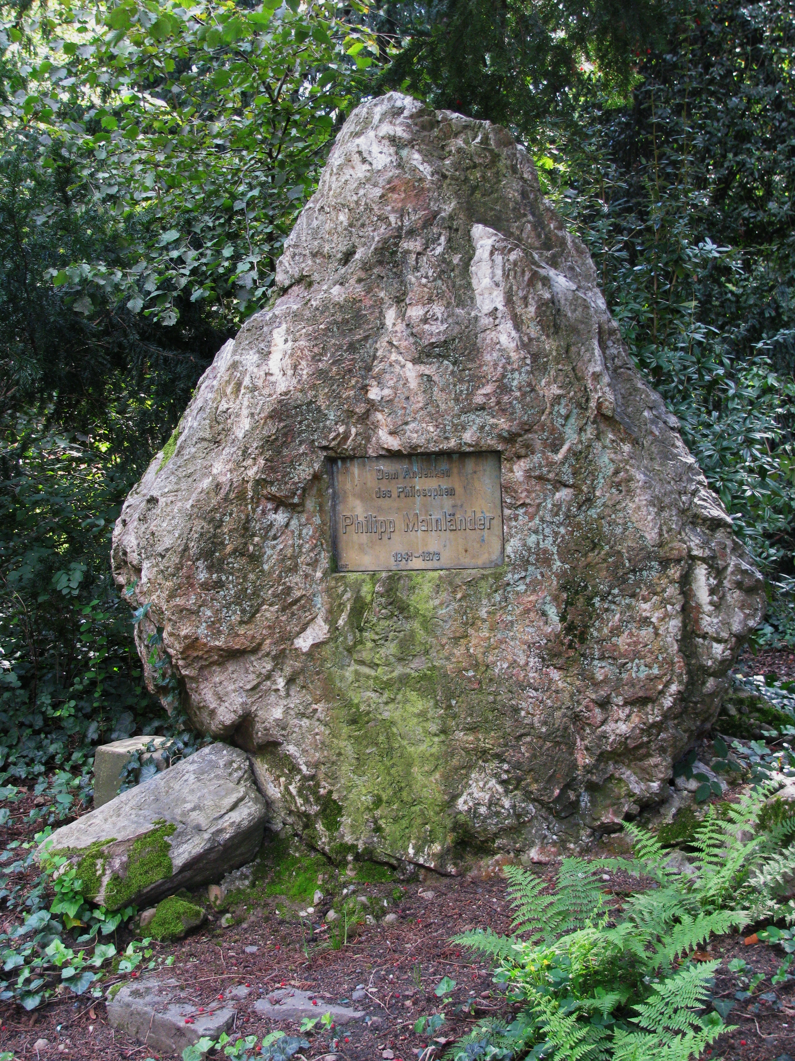 Gedenkstein für den Offenbacher Philosophen Philipp Mainländer. Gestiftet von "Anhängern der Mainländerschen Gedankenwelt"